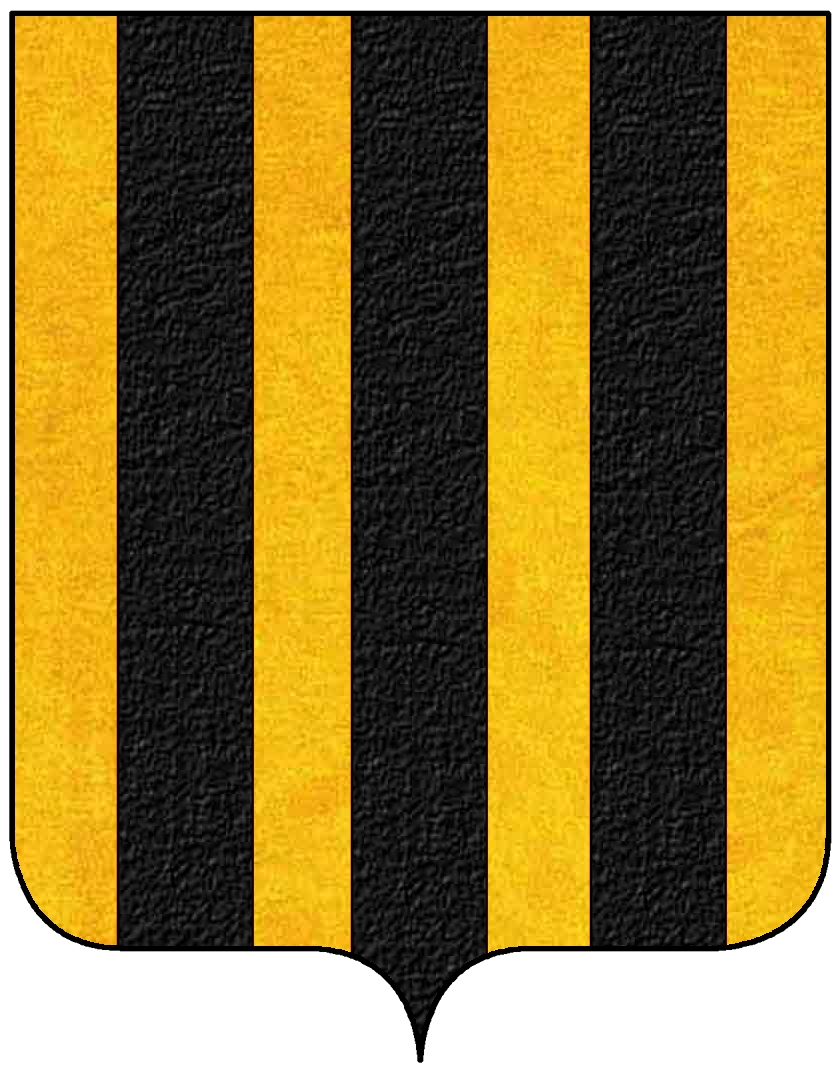 Stemma della famiglia Alliata